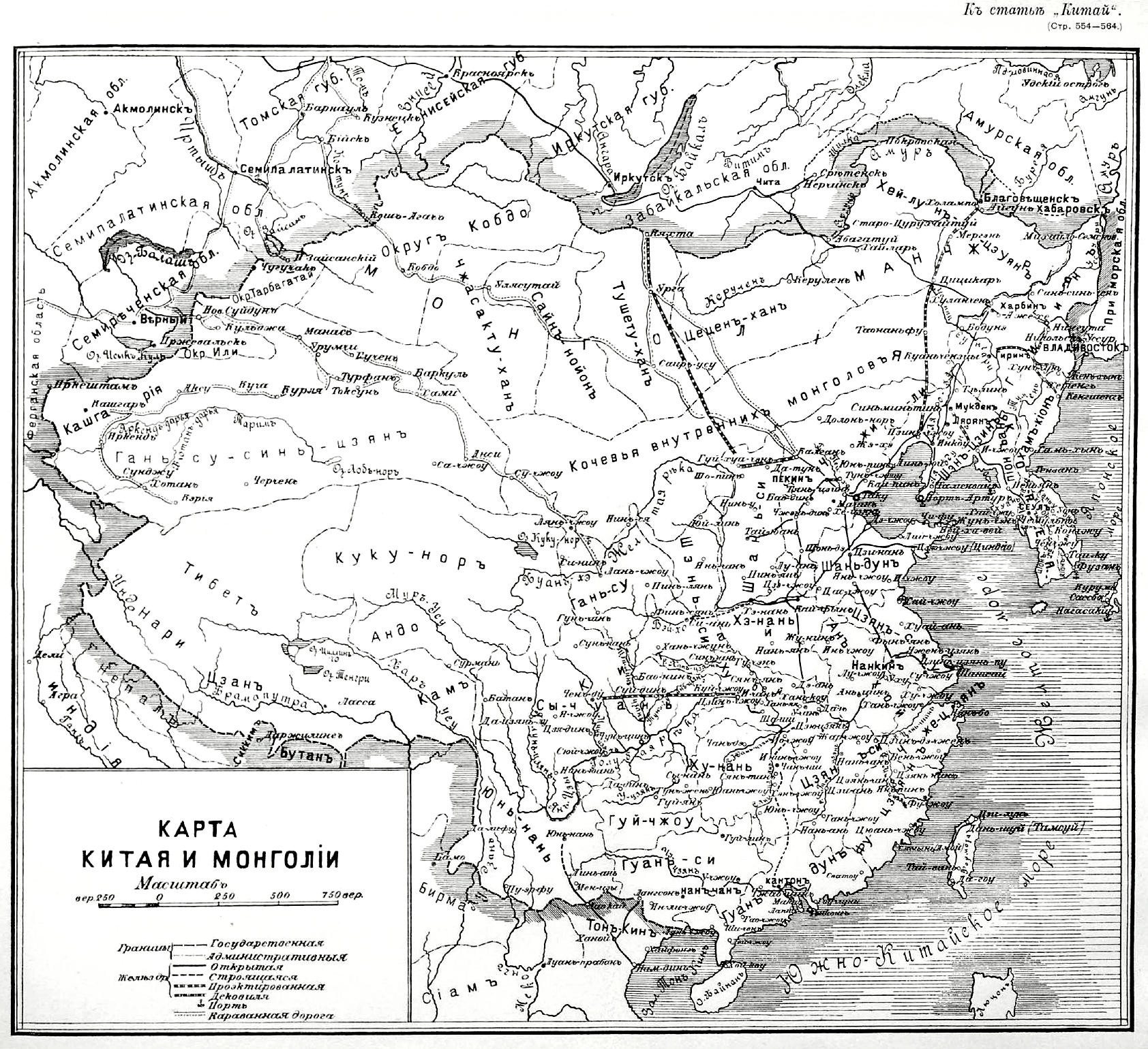 Это изображение было использовано для иллюстрирования статьи «Китай» опубликованной в двенадцатом томе «Военной энциклопедии», который был издан книгоиздательским товариществом И. Д. Сытина в 1913 году в столице Российской империи городе Санкт-Петербурге. Более подробное описание к этой картинке можно прочесть в указанной выше статье.